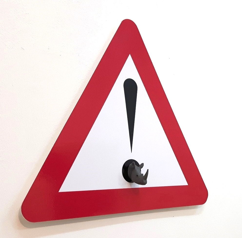 תמרור אזהרה מס 12 2018 צילום מטופל ופריט רדי מייד על פי.וי.סי